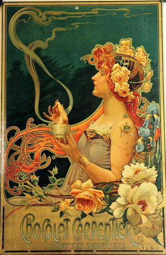 Chocolat Carpentier